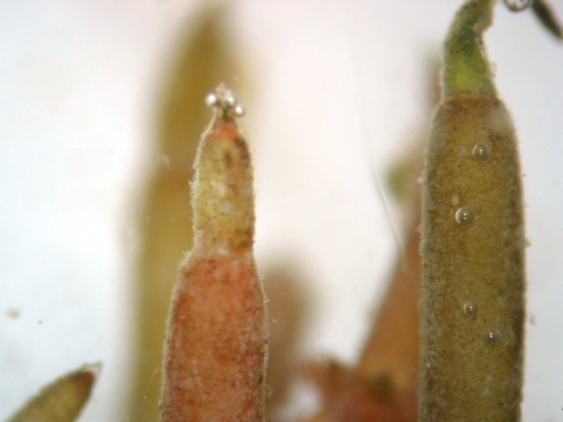 Geweih-Armleuchteralge Chara tomentosa, Astspitze, Müritz-Gebiet